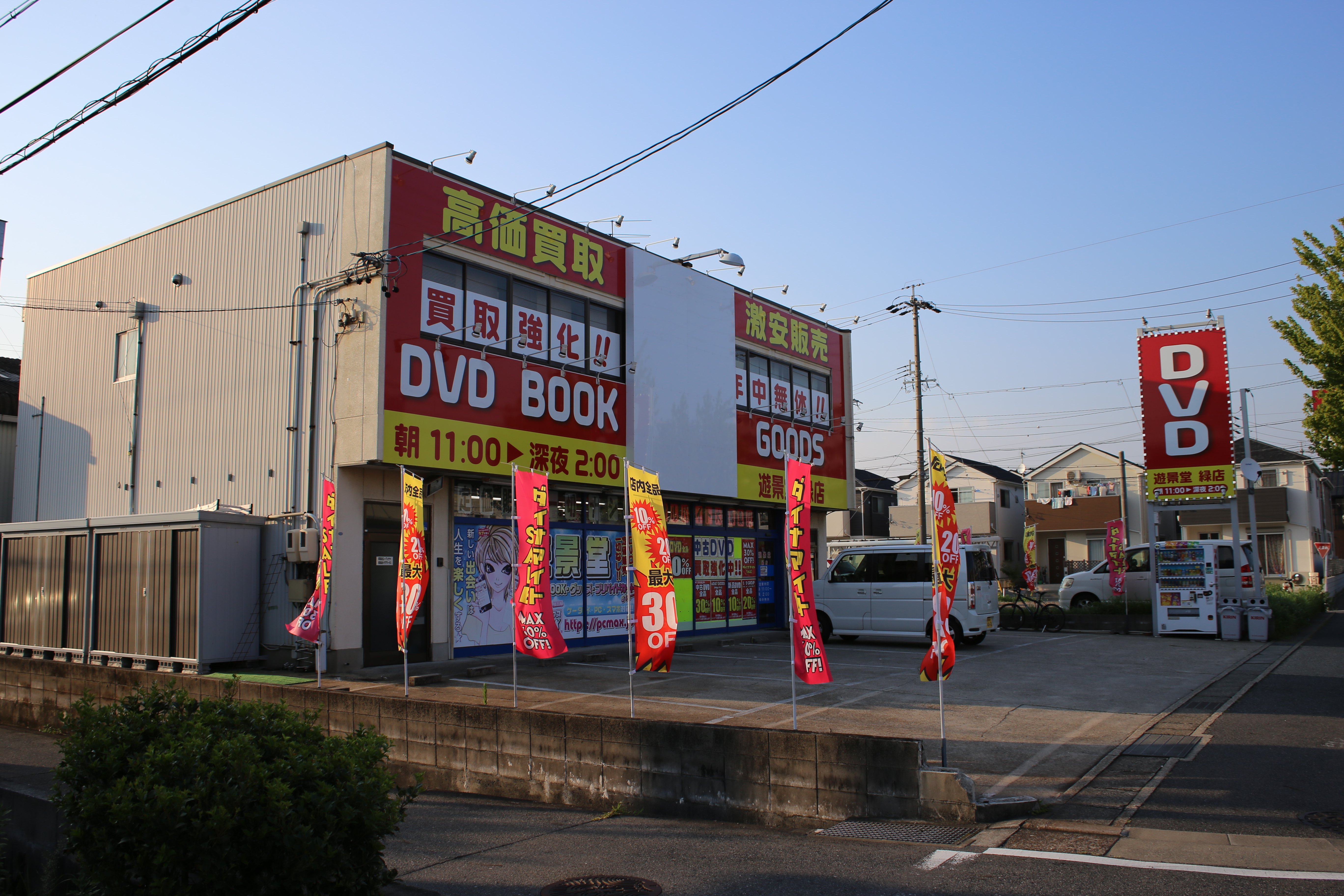 名古屋市緑区鳴海町中汐田のユーアンドケイ本社を東側公道南側より撮影